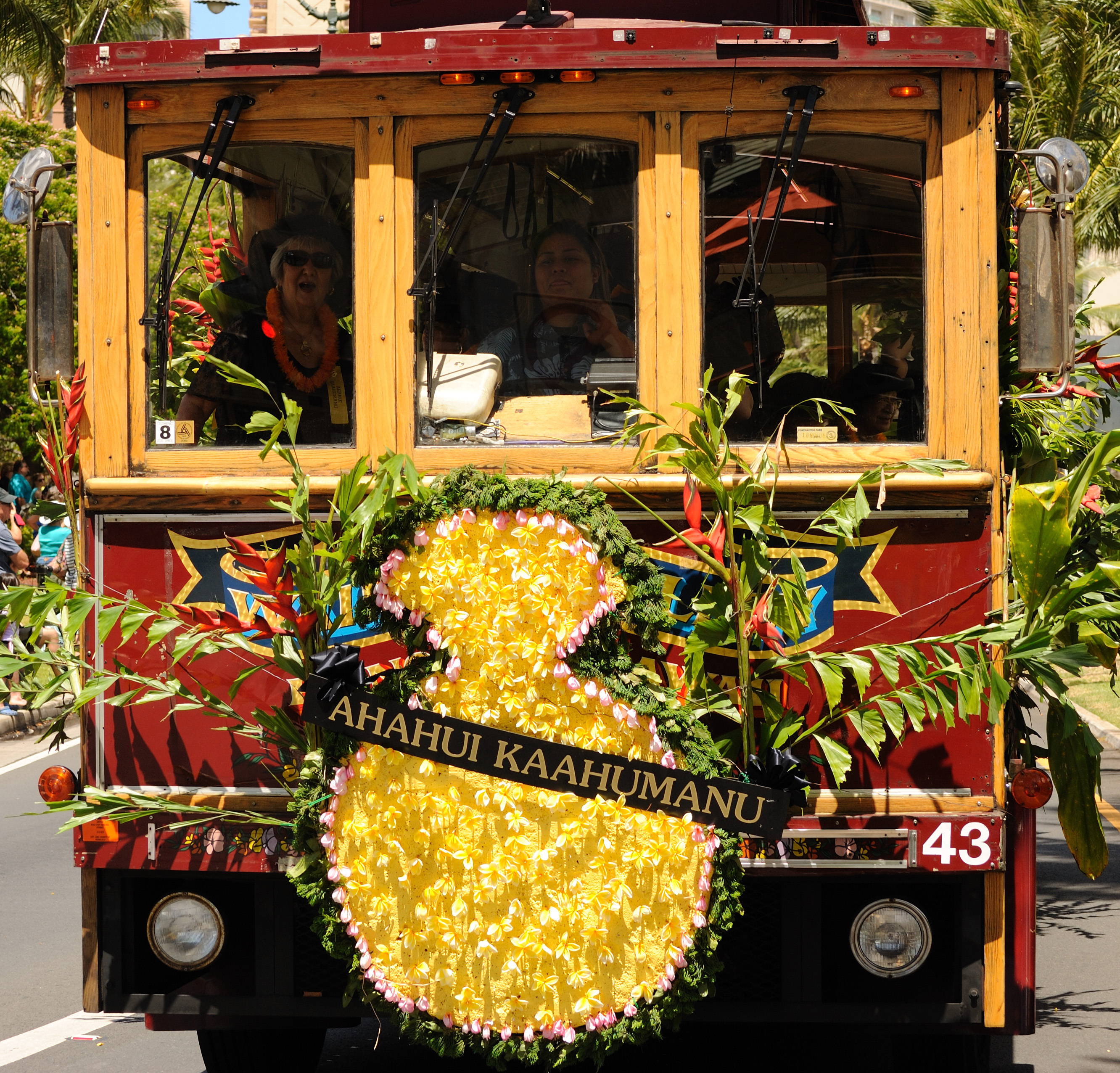 Ahahui Kaahumanu Society